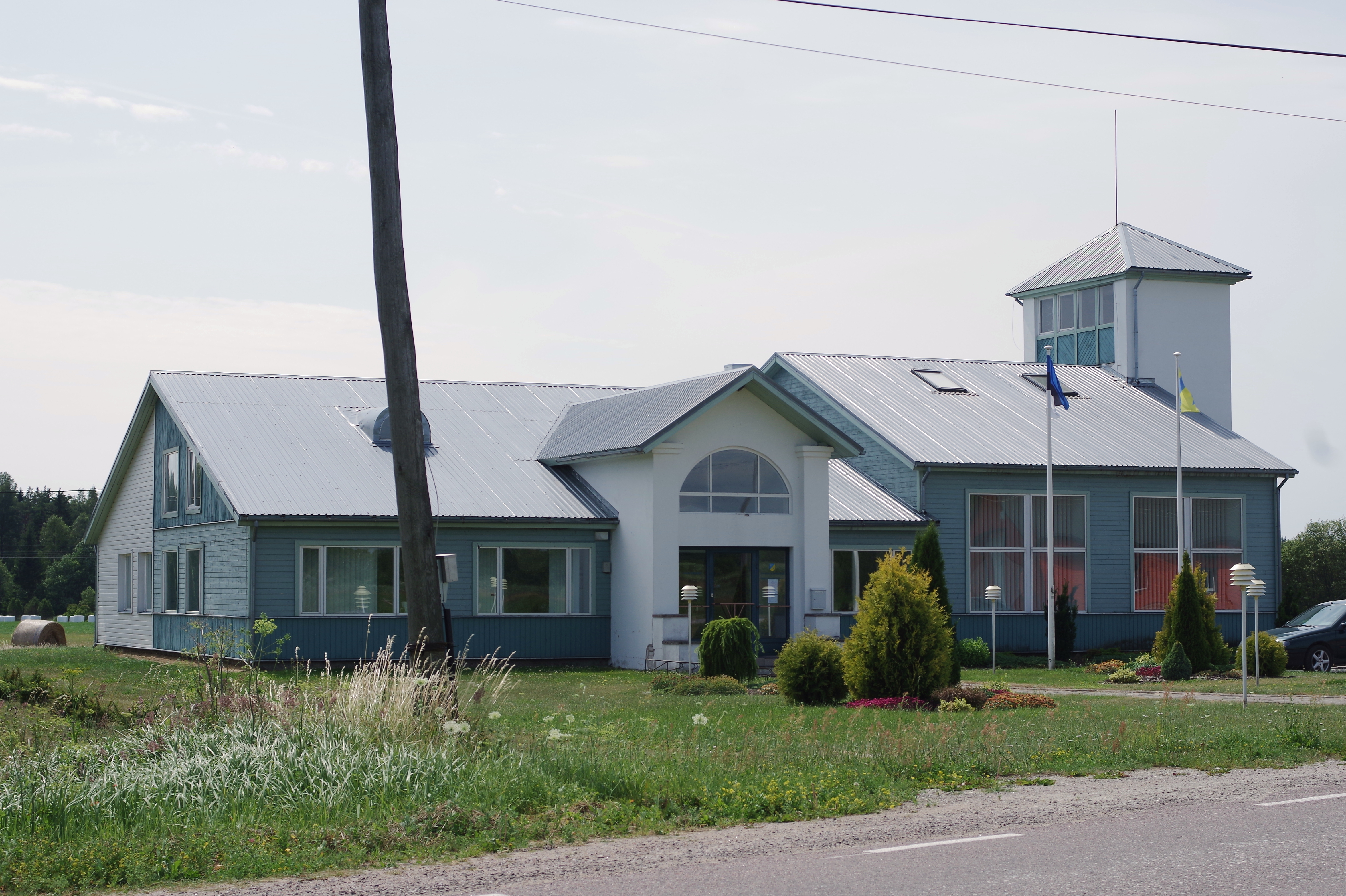 Pihtla vallamaja, Pihtla vald, Saaremaa.